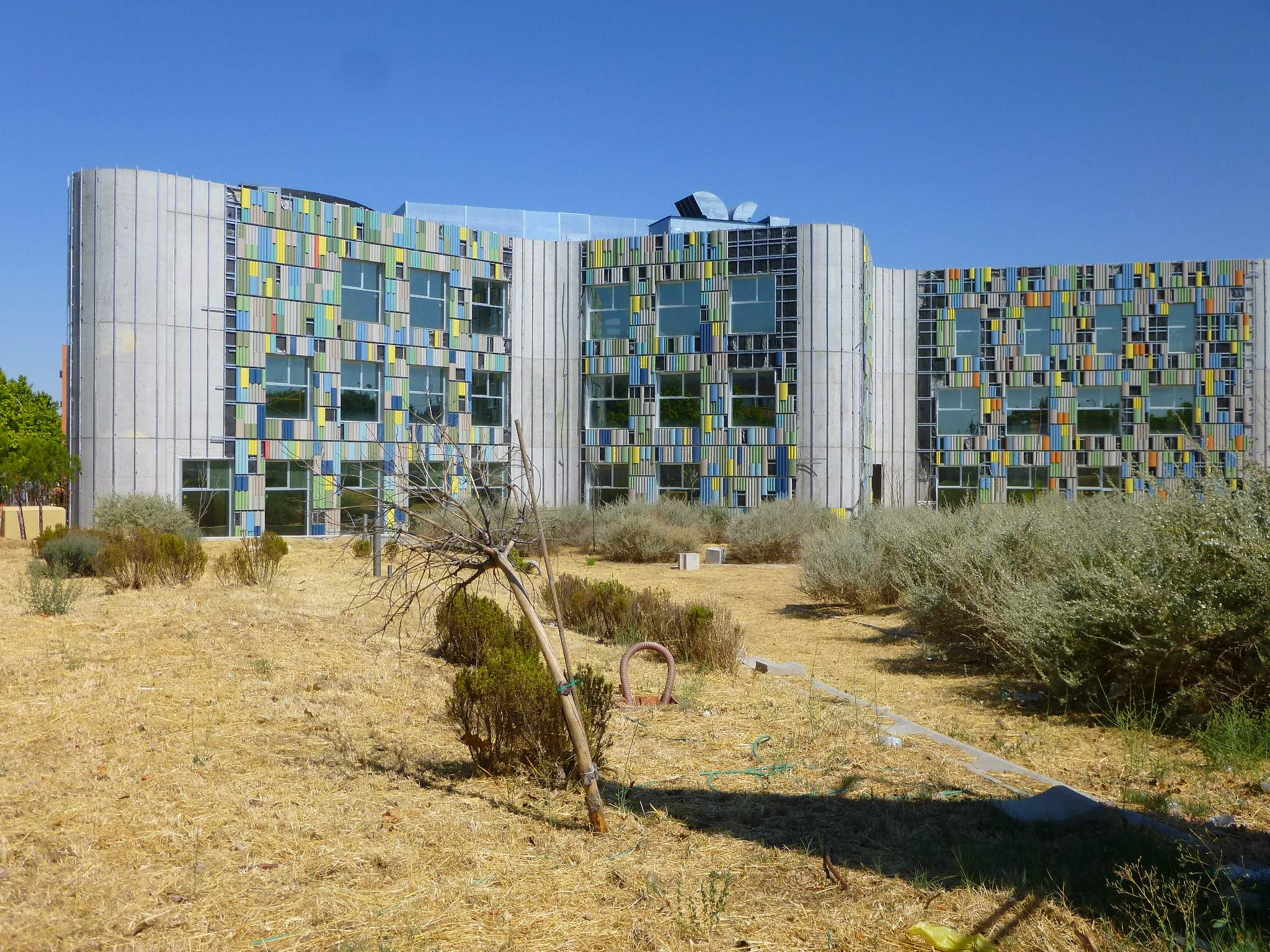 Biblioteca Central y Archivo Municipal Central de Leganés, una de las varias obras públicas que la crisis y la corrupción dejaron sin terminar y semi-abandonadas